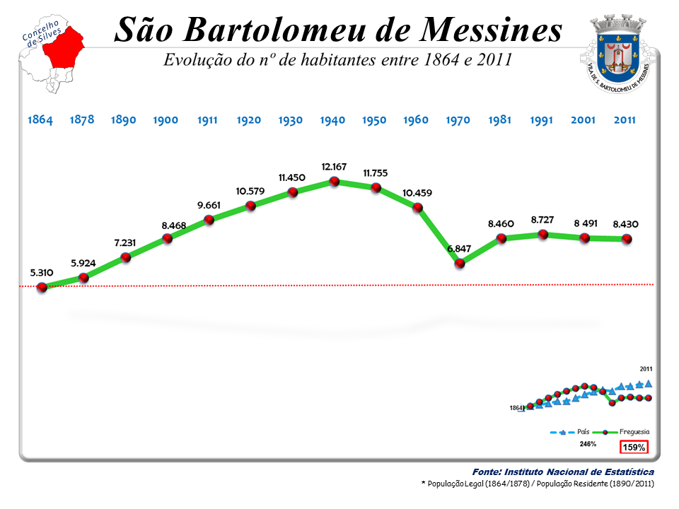 Censos 1864/2011